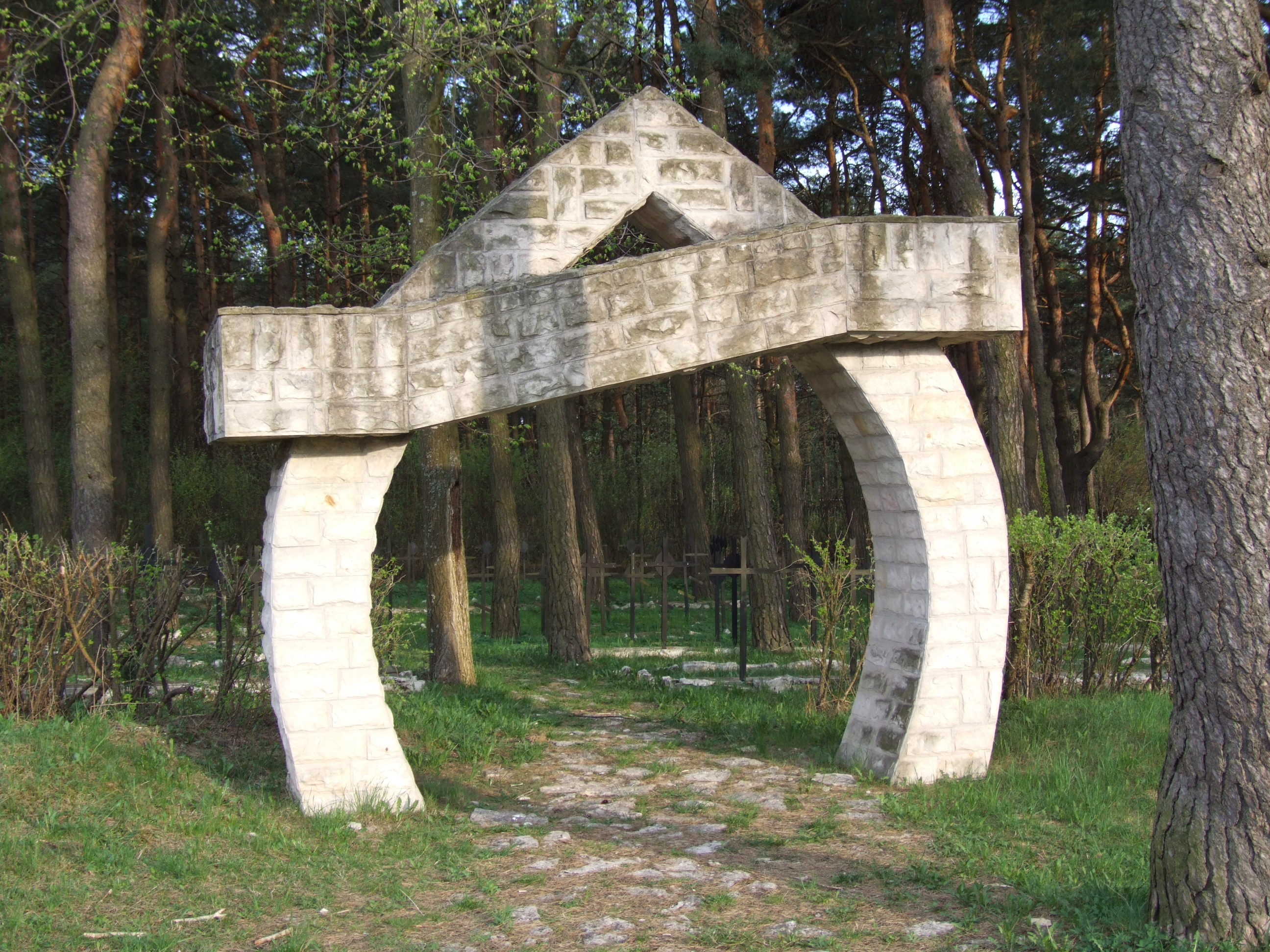 Cmentarz wojskowy w Kotowicach - brama wejściowa